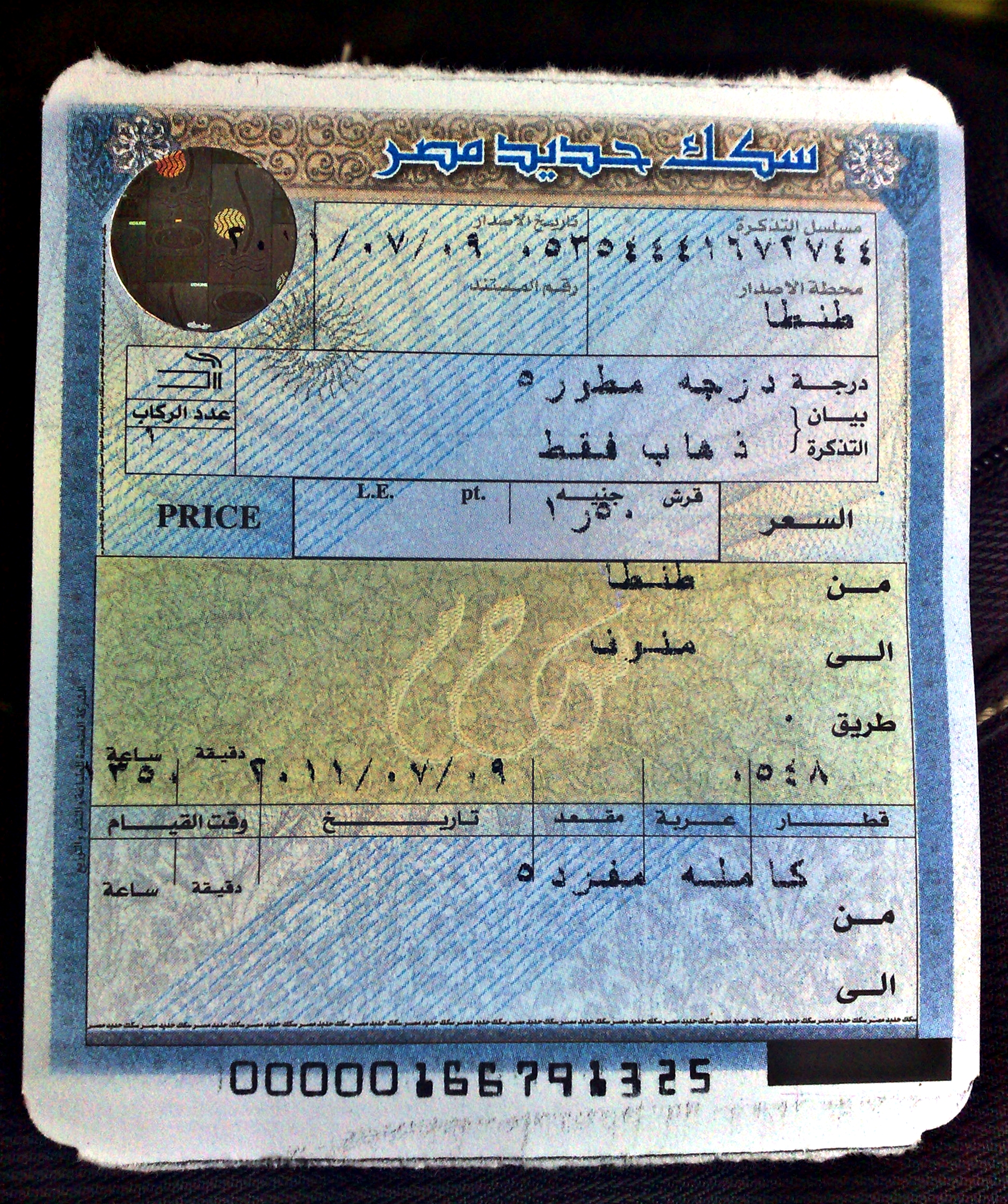 تذكرة سكك حديد مصر من طنطا إلى منوف.